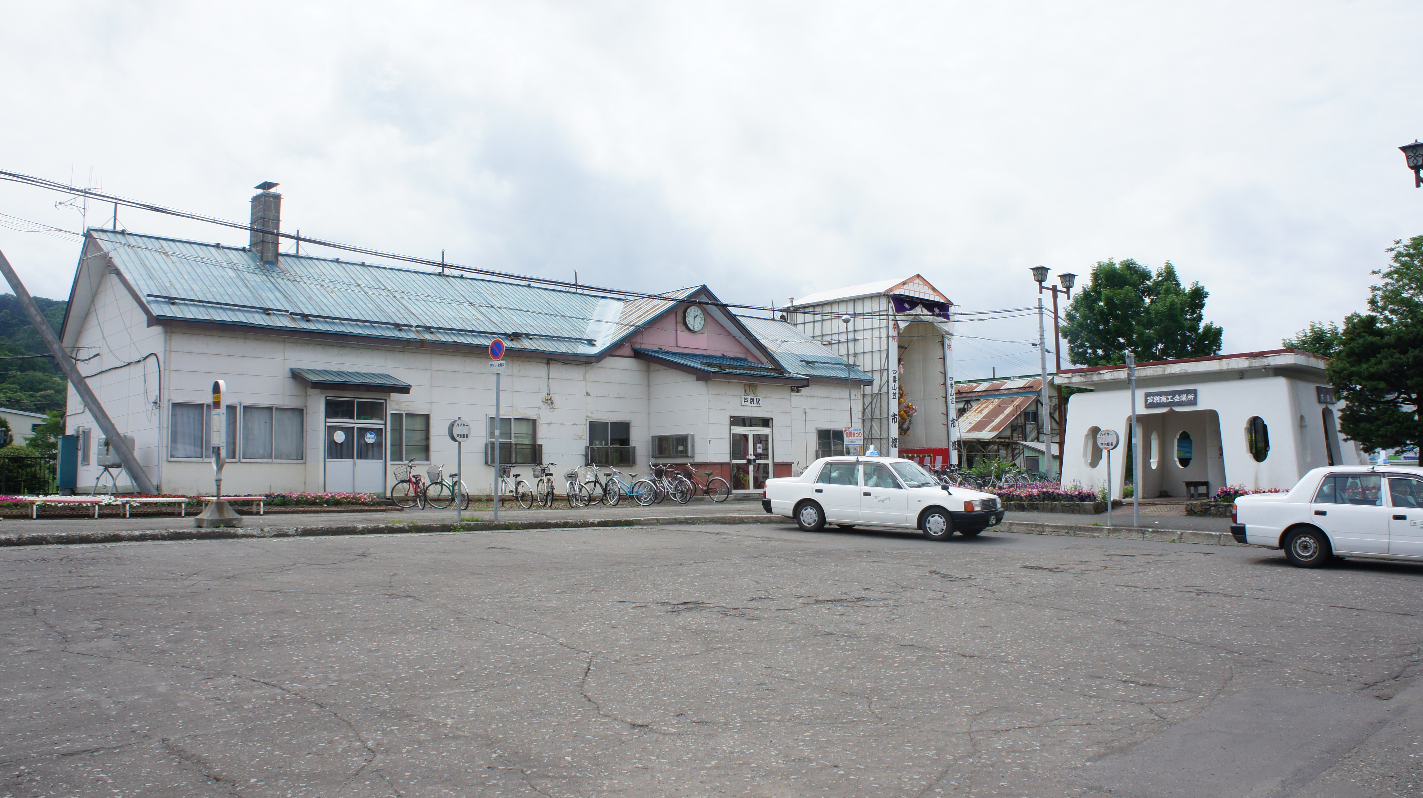 JR根室本線・芦別駅の駅舎（撤去された五重塔も含めて撮影）